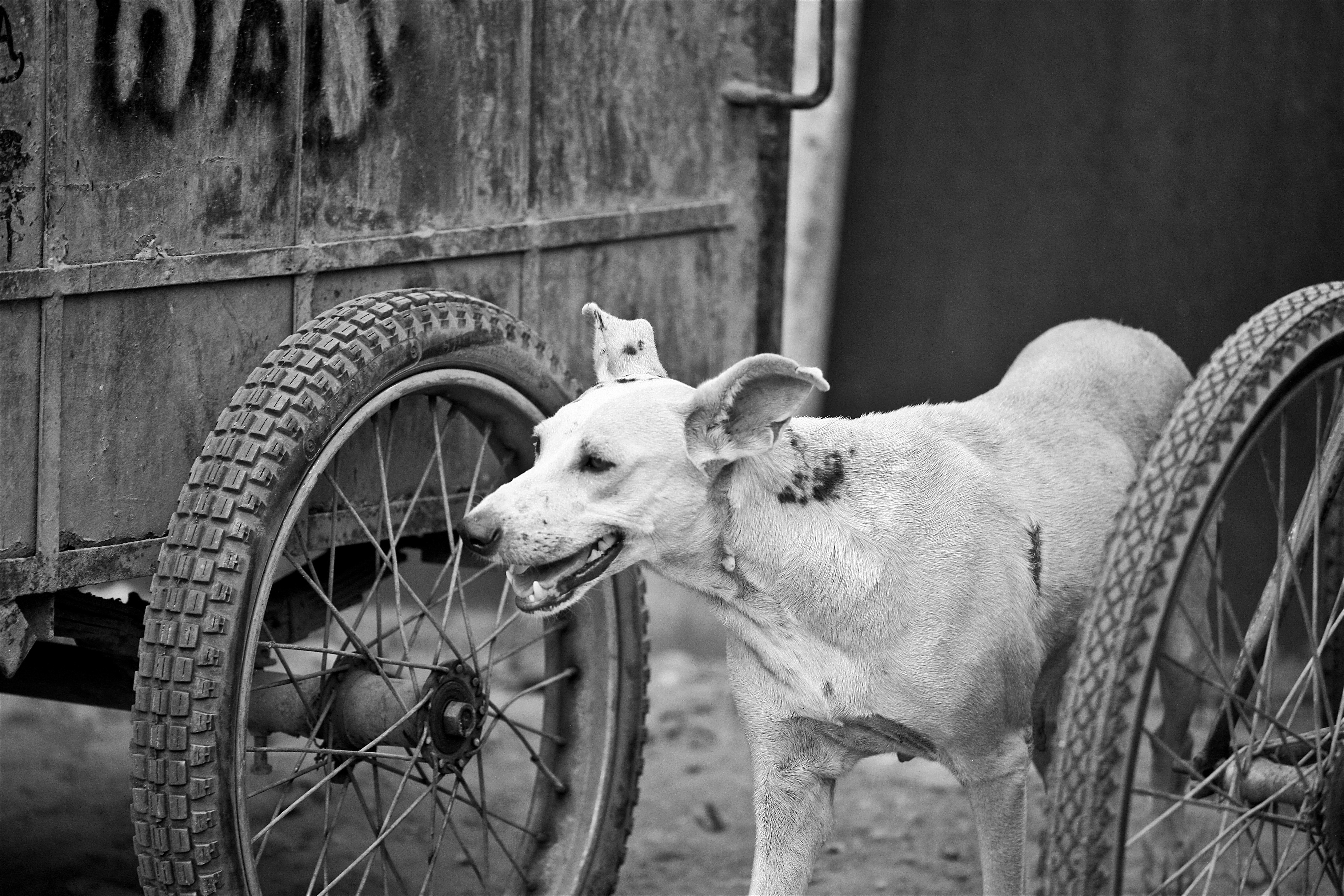 Dog between the Wheels